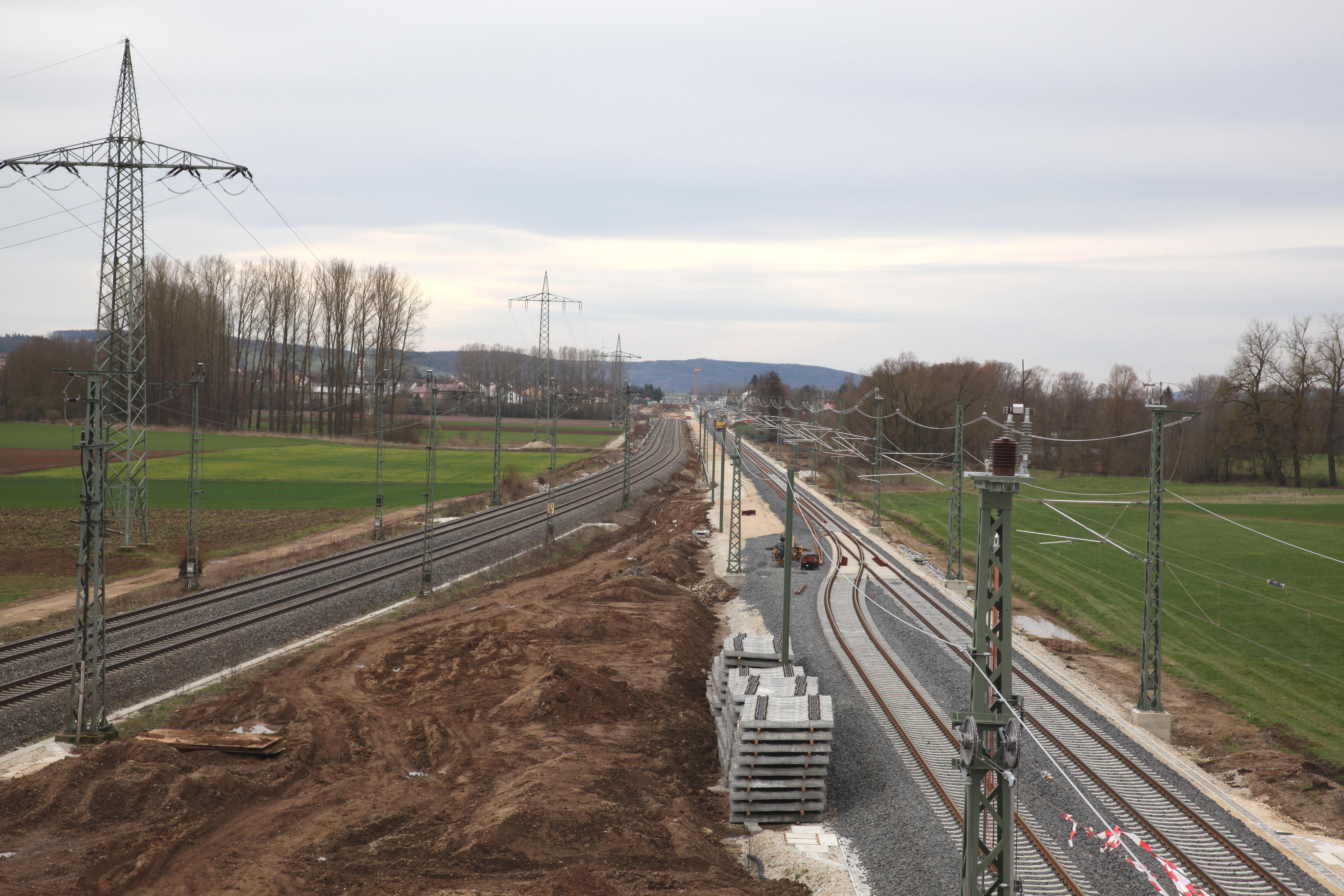 Neubaustrecke Ebensfeld-Erfurt bei Ebensfeld, mit Blick Richtung Süden. Die Neubaustrecke (zweigleisig, rechts) wird bauzeitlich über eine Bauweiche geführt. Die Neubaustrecke erreicht in diesem Bereich die Parallellage zur aus Richtung Hof kommenden und Richtung Bamberg führenden Bestandsstrecke (links).